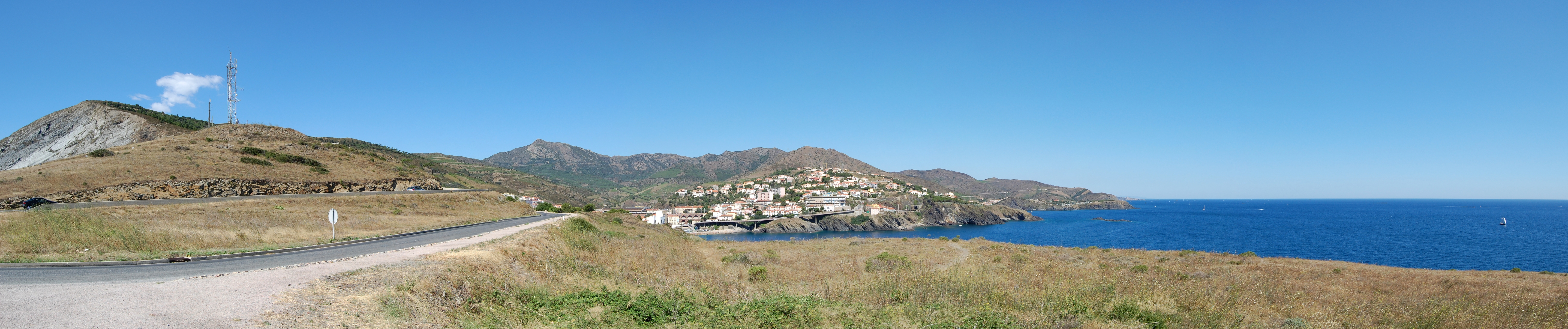 Panorama au sud-est de la commune de Cerbère, à la frontière espagnole. La route en lacet (la D914, à gauche du panorama) mène à la ville espagnole de Portbou. Travail personnel, sous licence CC-BY-SA-3.0. Appareil photo utilisé : Nikon D40